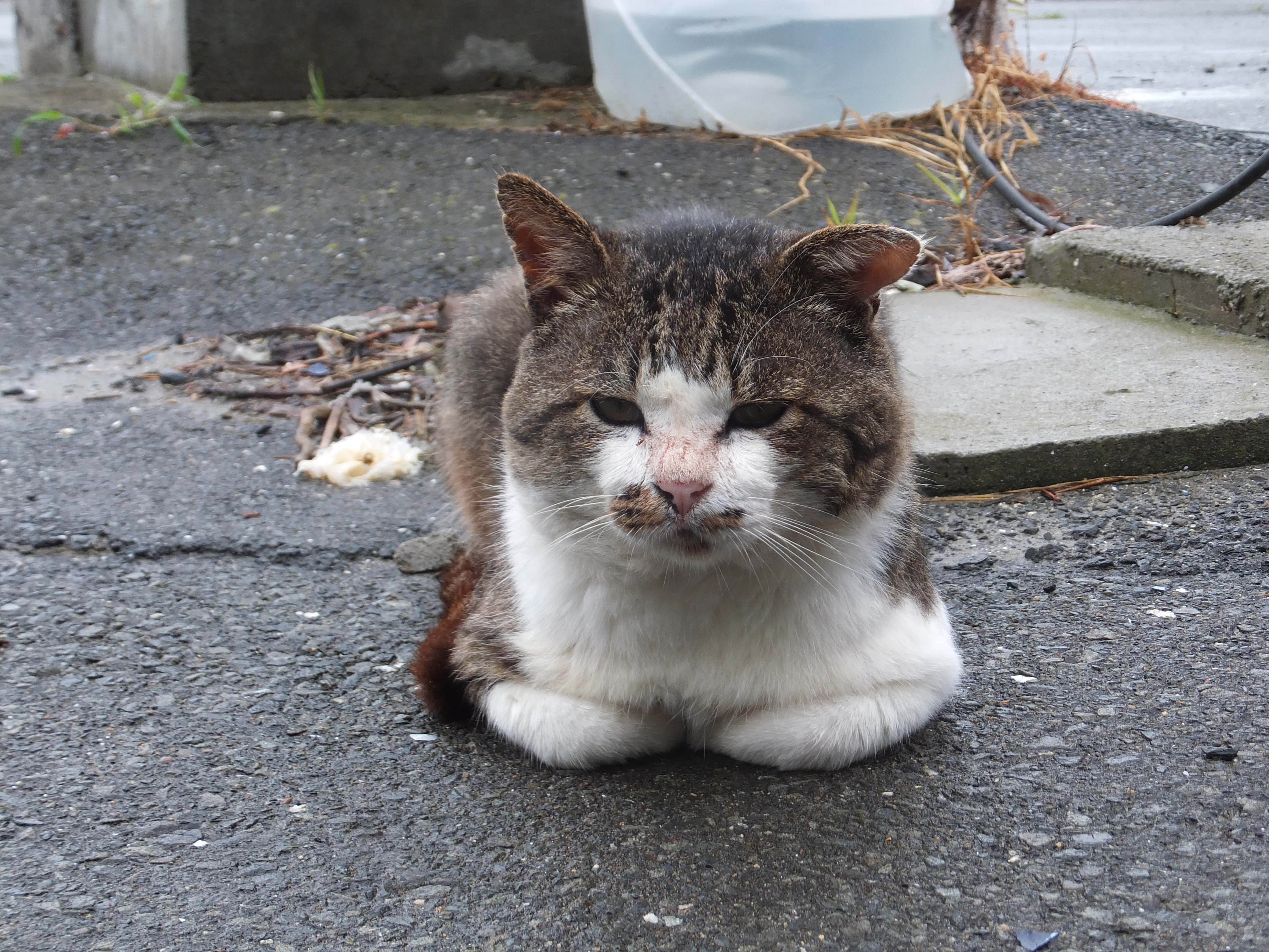 田代島のねこ太郎。島のアイドル猫。田代島の猫たちを撮ったDVDにも出てきます。